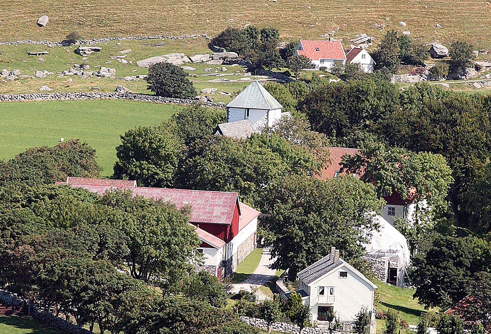 Utstein gard